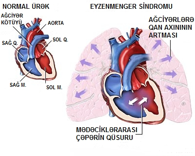 Eyzenmenger sindromu anadangəlmə ürək qüsurlarında sistem arterial təzyiqin qüsur dəliyi vasitəsilə ağciyər arteriyasına ötürülməsi nəticəsində meydana çıxan ağciyər arteriyasının hipertenziyasıdır. Bu zaman ağciyərlərin damar sistemində, xüsusilə kiçik diametrli ağciyər arteriolalarında obstruktiv dəyişikliklər (damar divarının gedən struktiv dəyişikliklər nəticəsində qalınlaşması prosesi) gedərək onlarda diffuz daralmalar əmələ gəlir ki, bu da onların qandaşıma funksiyasının pozulmasına gətirib çıxarır. Eyzenmenger sindromunda ağciyər arteriyasındakı təzyiq sistem arterial təzyiqə bərabər olur. Nəticə etibarilə sağ mədəcikdə müqavimətin kəskin artması venoz qanın qüsur dəliyi vasitəsilə geri aorta sisteminə atılması, sağ-sol şuntu baş verir və sianoz inkişaf edir.